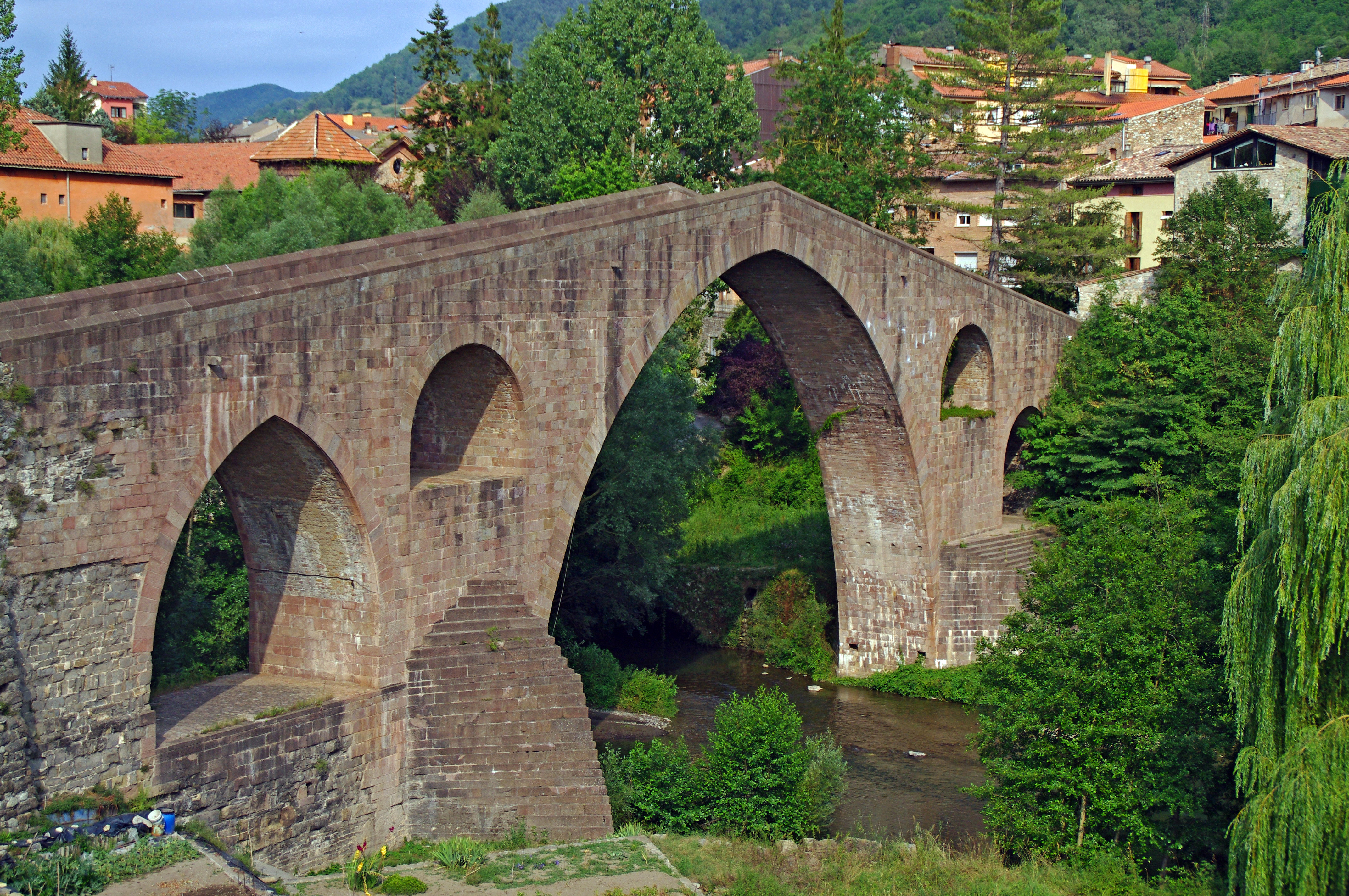 Pont Vell de Sant Joan de les Abadesses